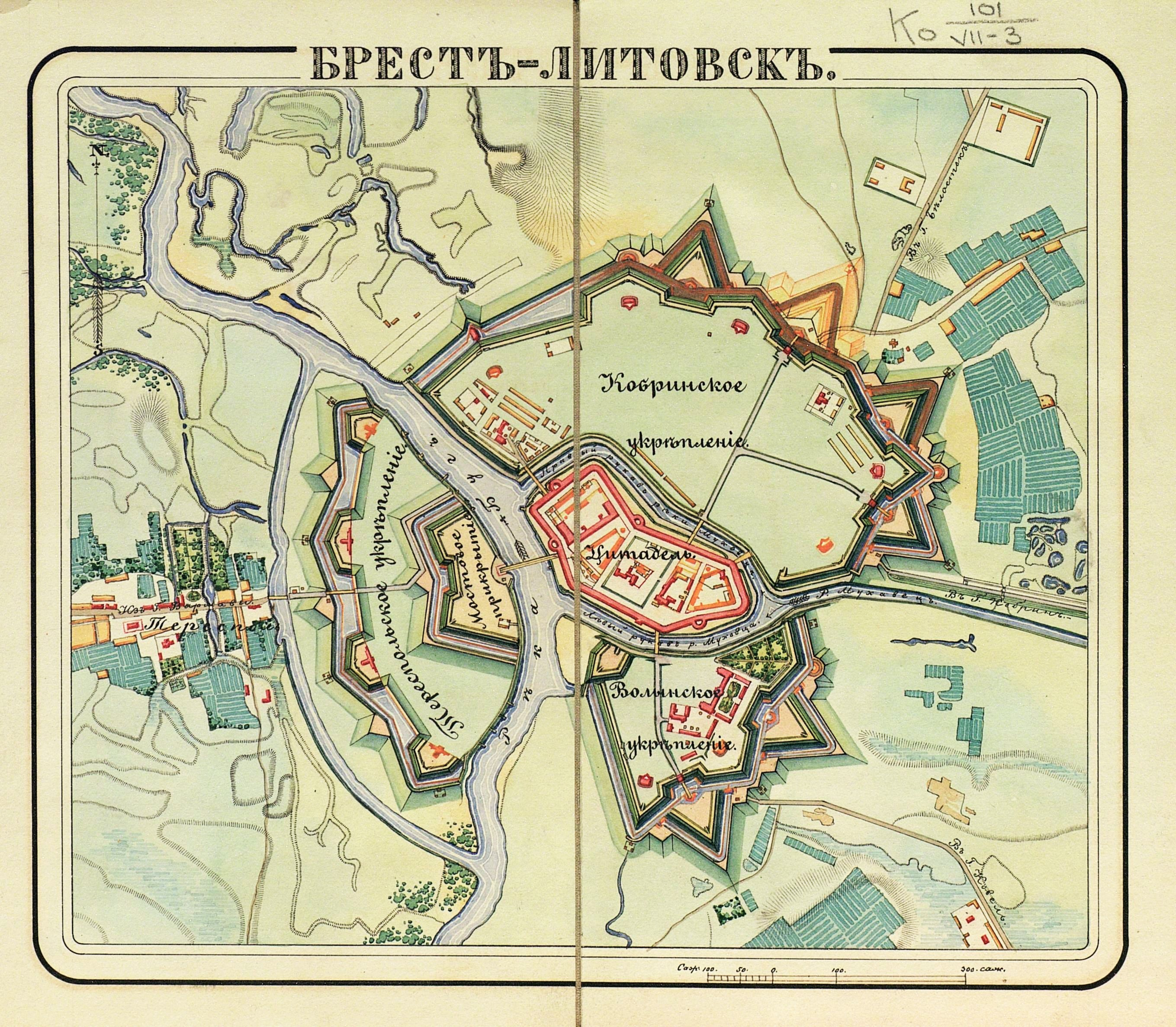 Брест-Литовск.